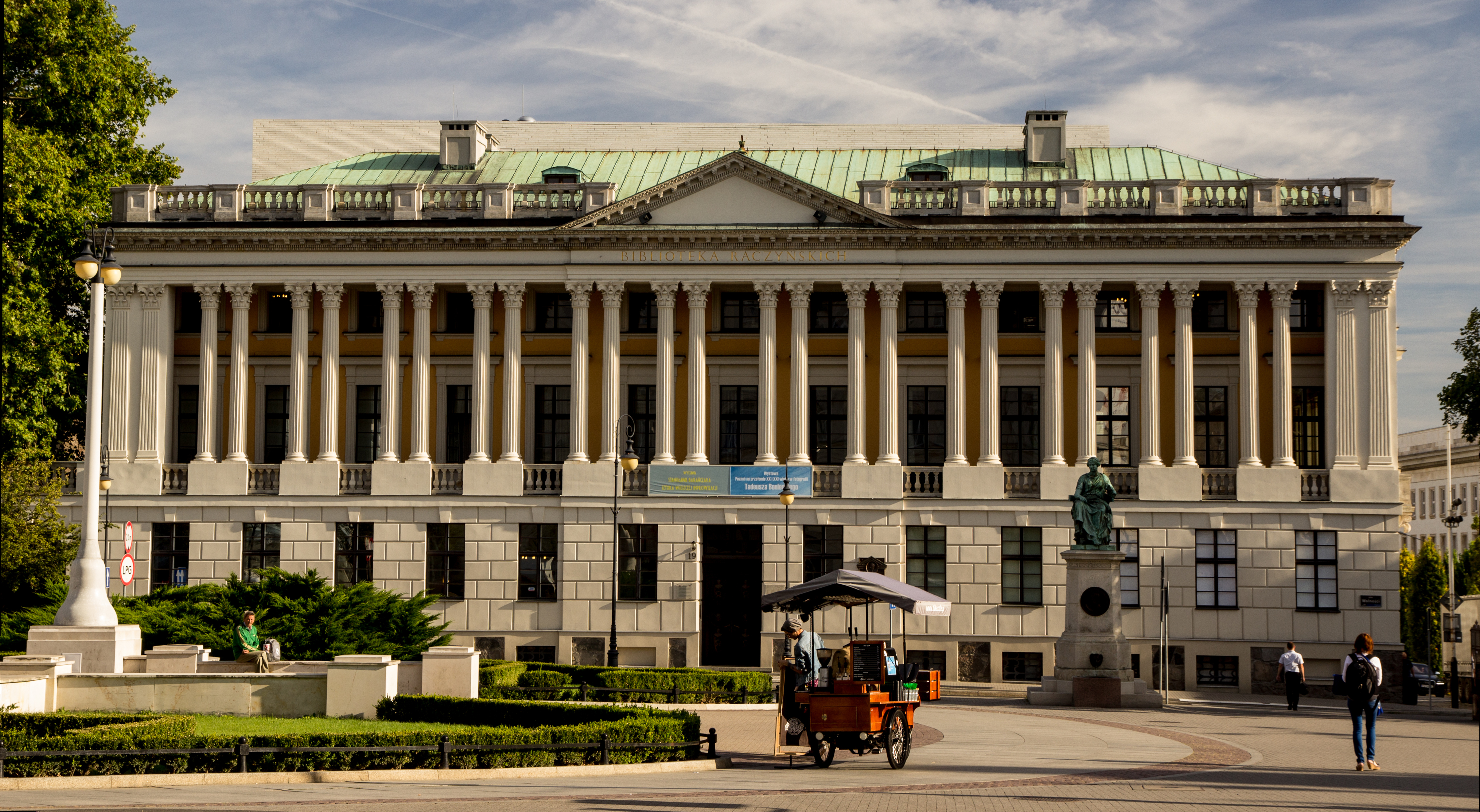 Biblioteka Raczyńskich w Poznaniu